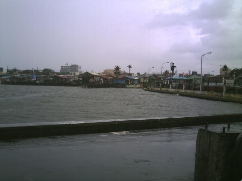 Storm Surge.jpg